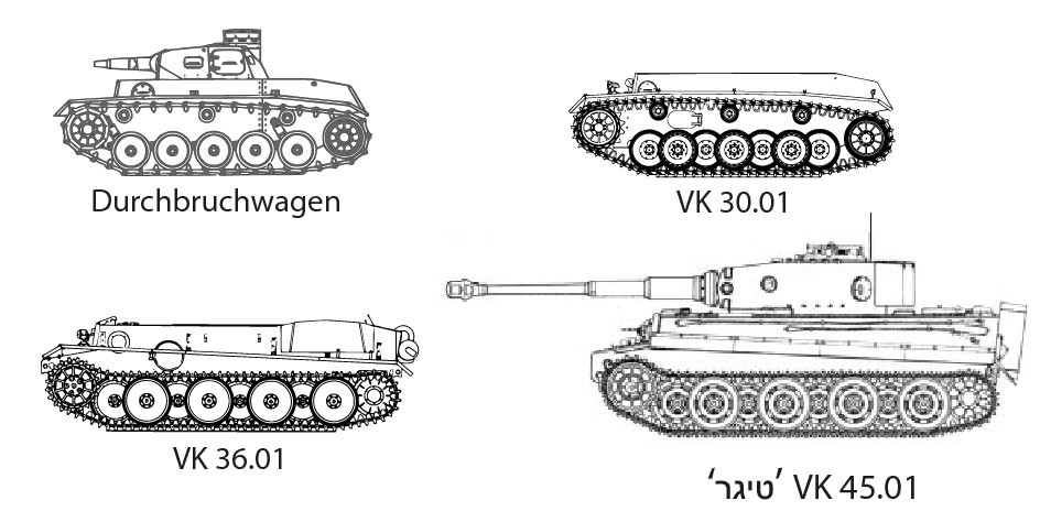 .שלבים בפיתוח טנק הטיגר